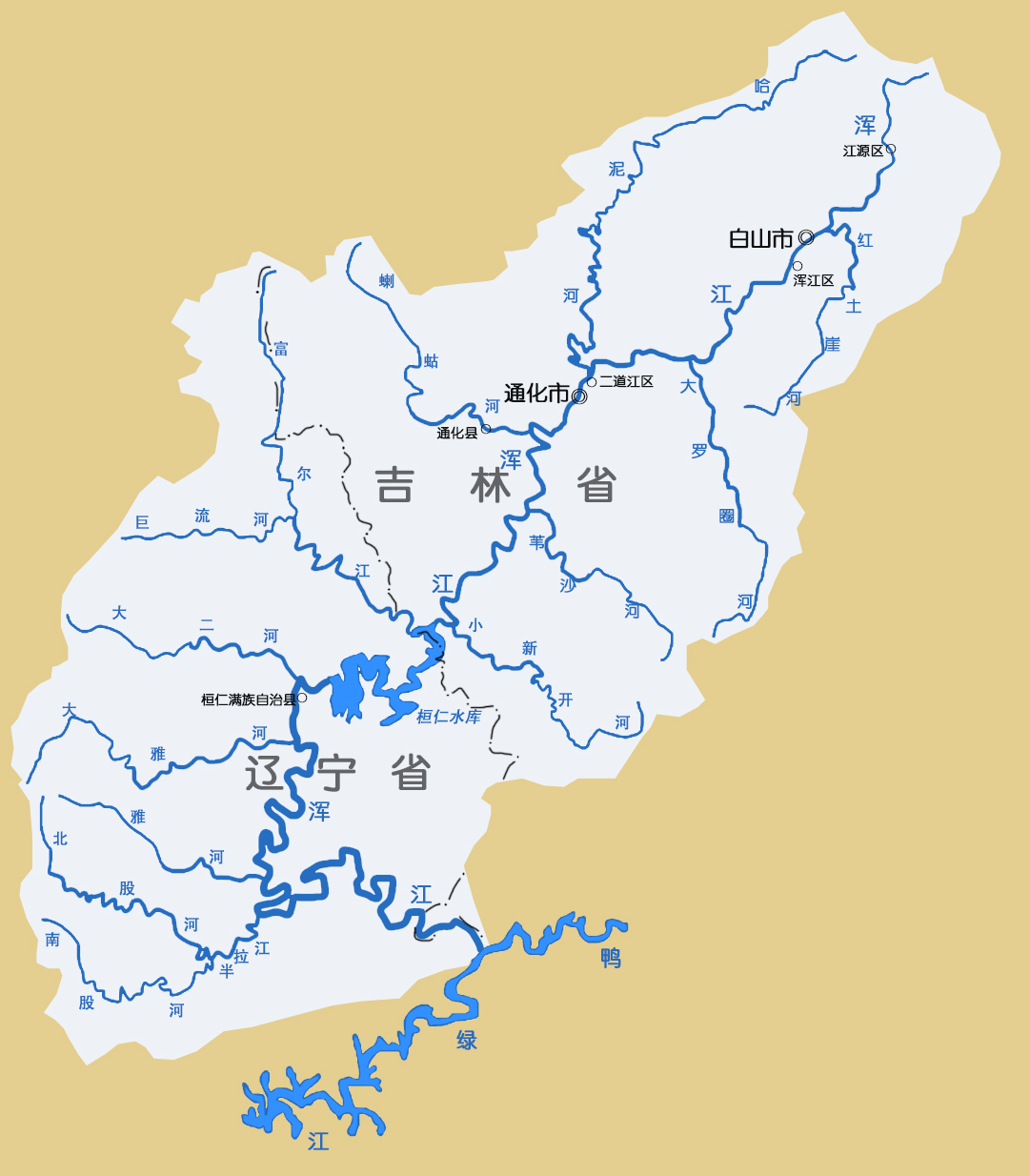 浑江流域示意图。根据《中国河湖大典·黑龙江 辽河卷》绘制。